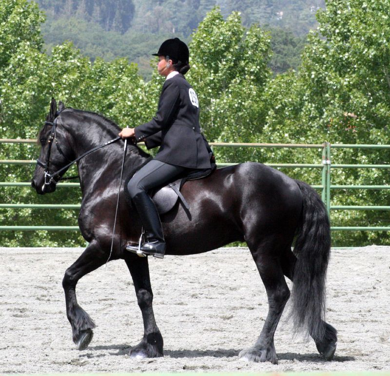 Friesian